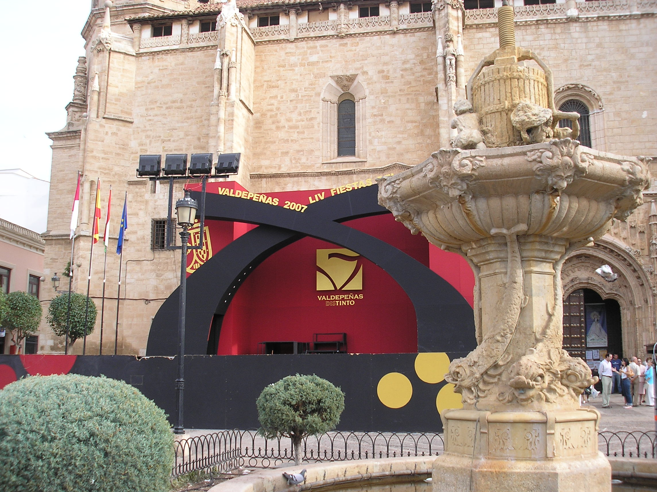 Valdepeñas.Fiestas.2007